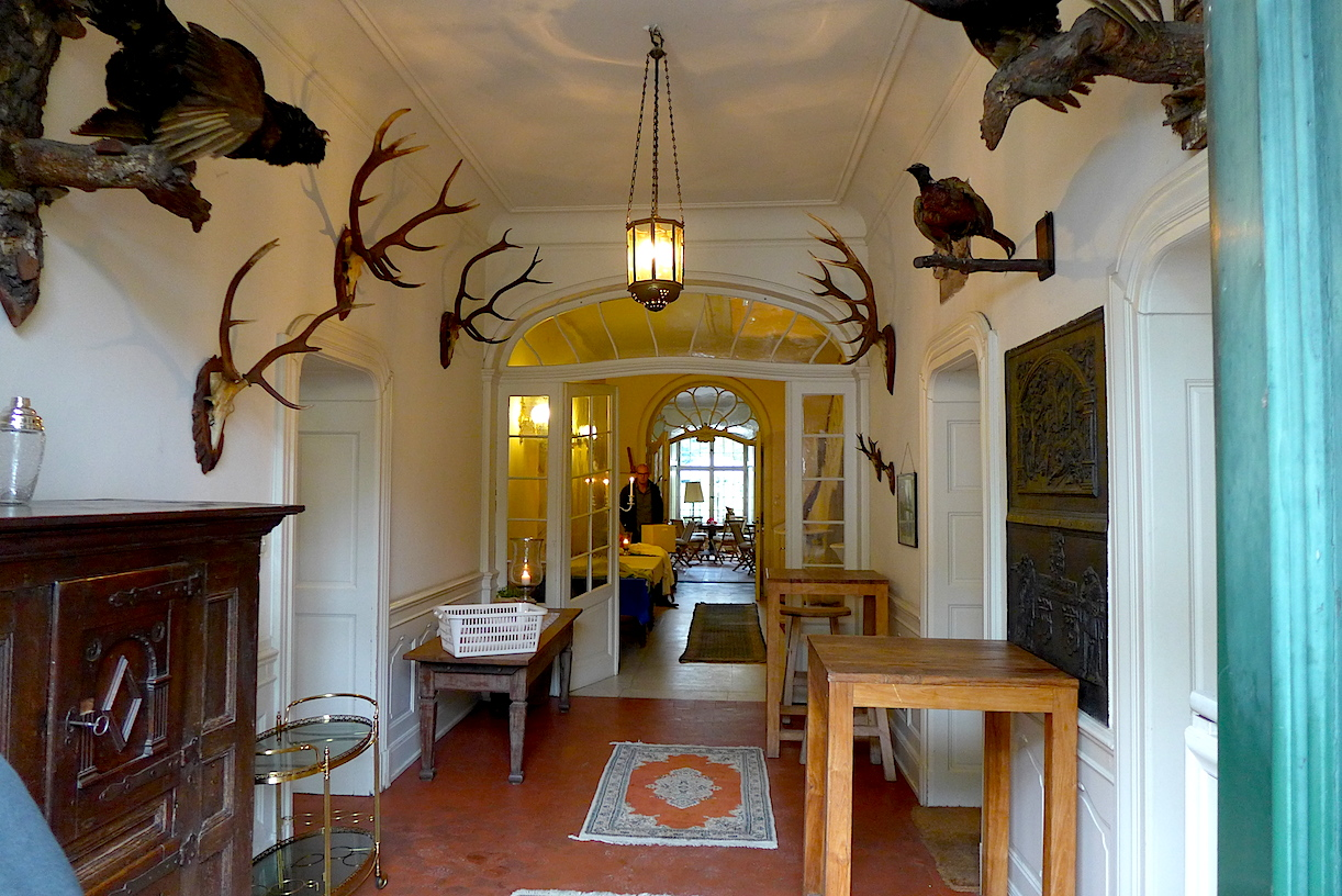 "Тропа Клинка" - туристский маркированнный маршрут вокруг немецкого города Золинген (Северный Рейн-Вестфалия). Седьмой этап: окрестностями Лангенфельда. 8.4 км.